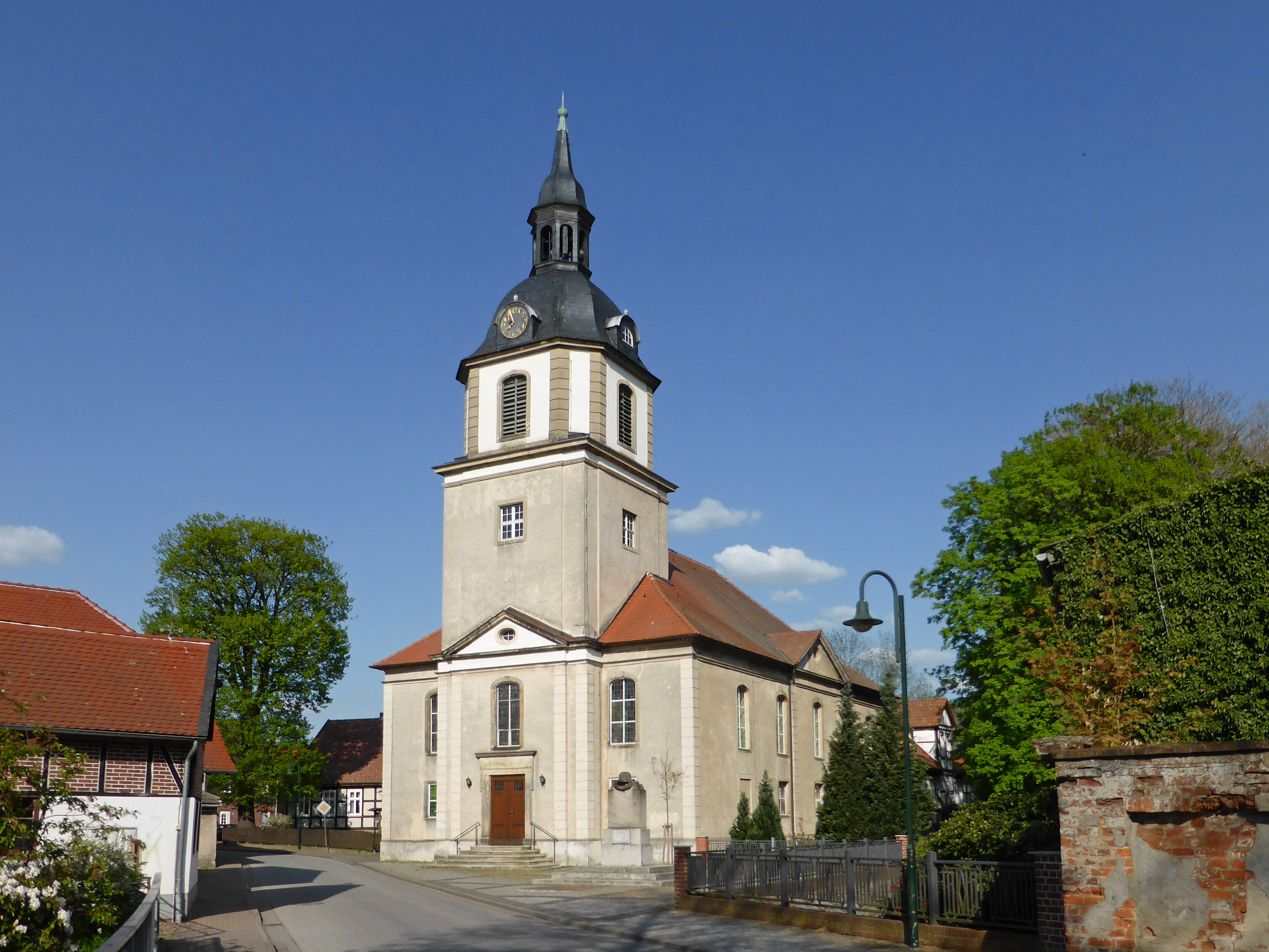 Evangelische Kirche in Beetzendorf.